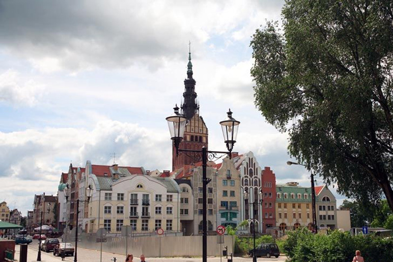 Polska